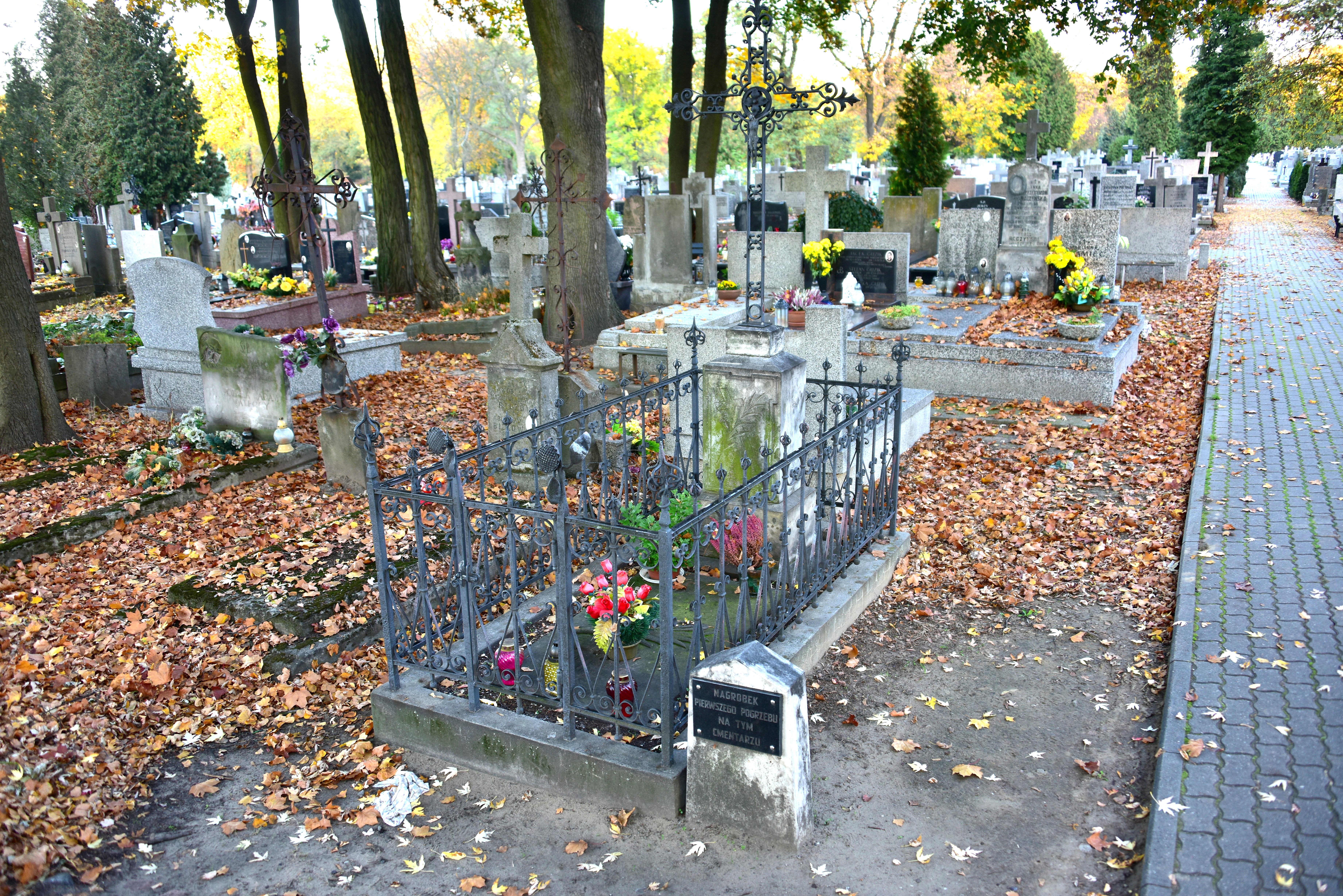 Upamiętnienie miejsca pierwszego pochówku na cmentarzu Bródnowskim w Warszawie - zrekonstruowany nagrobek Marii Skibniewskiej